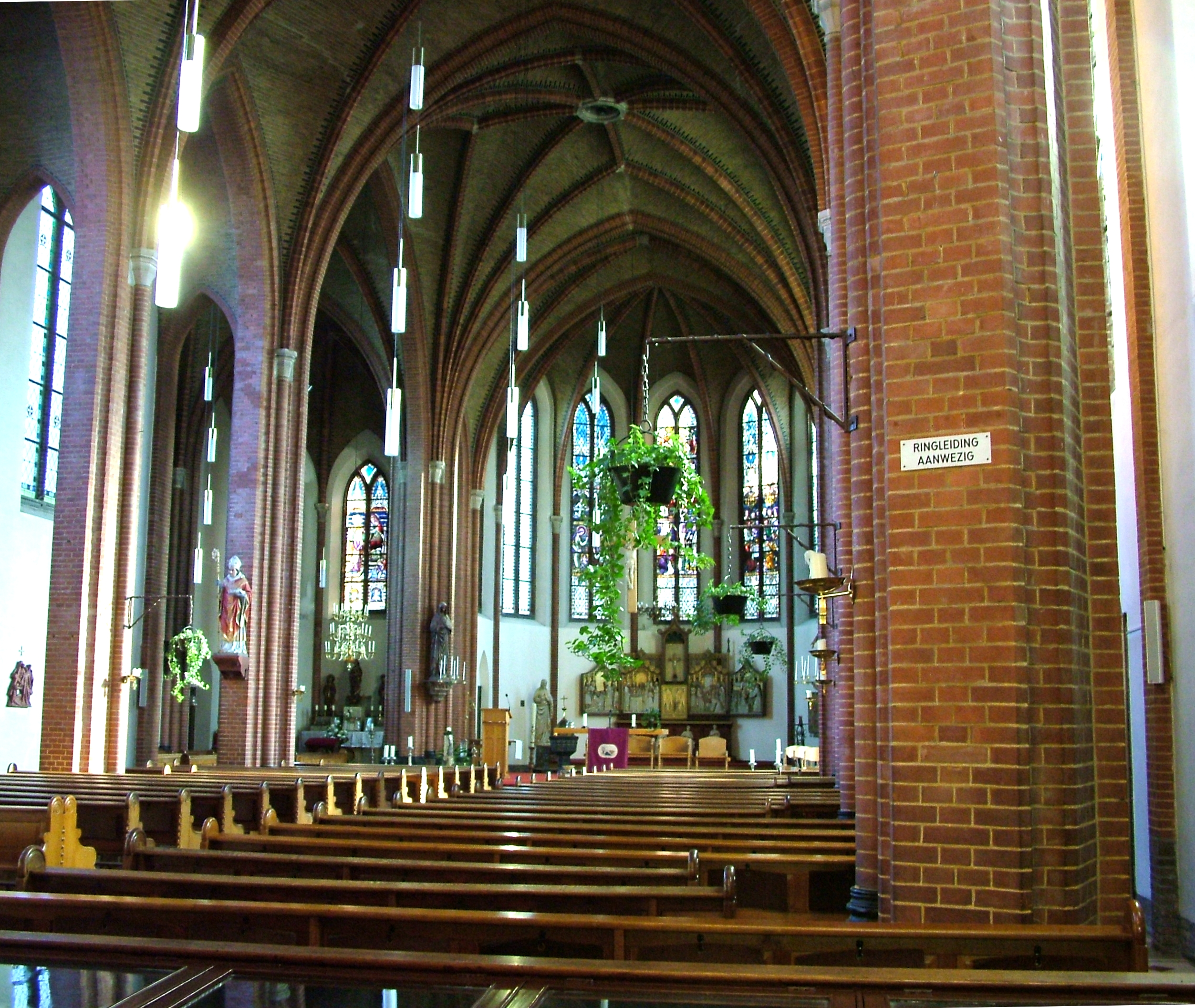 St. Georgius (kath. Kirche in Terborg), Innenraum